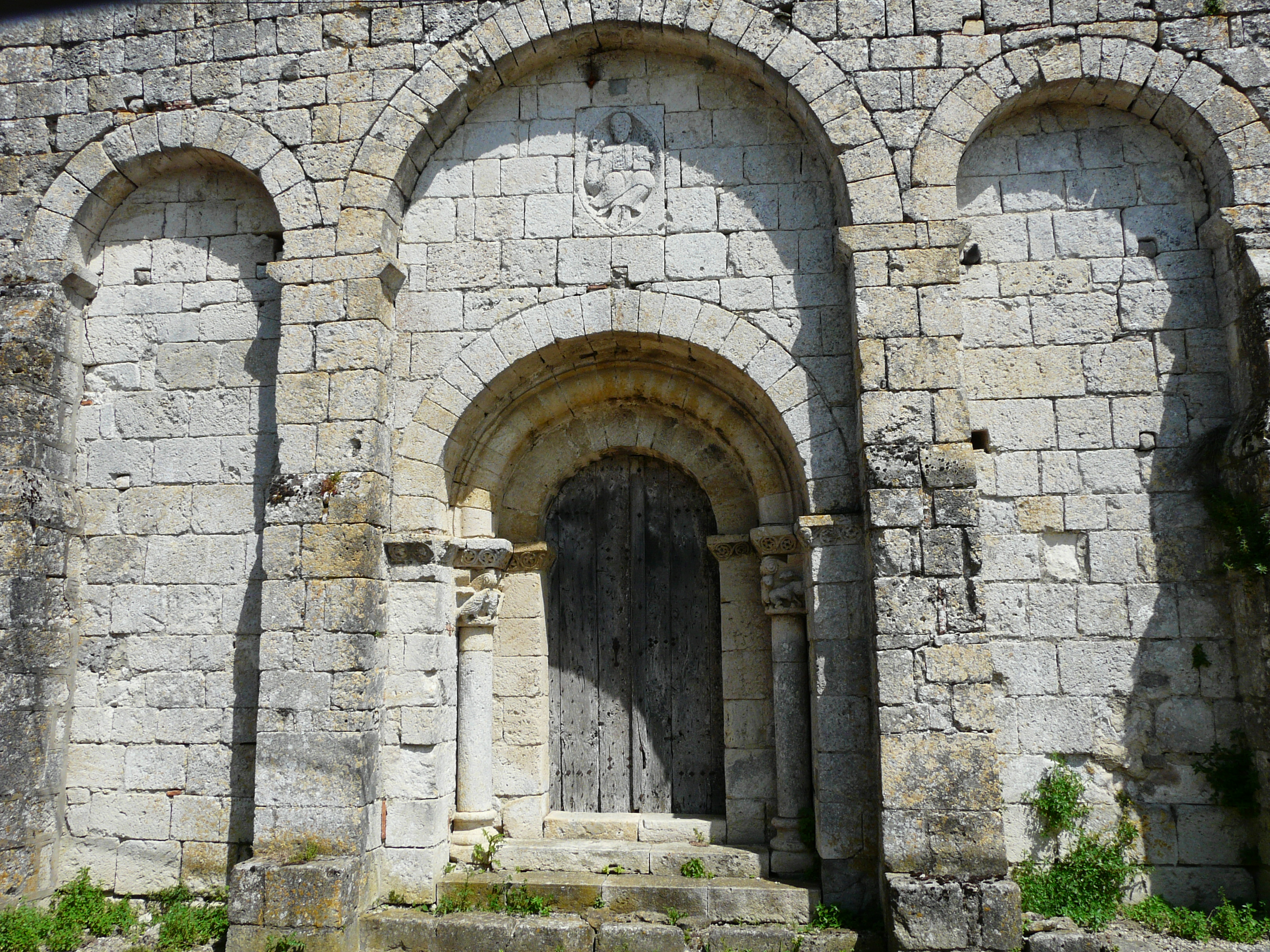 Le portail de l'église Saint-Étienne de Fontarède, Moncaut, Lot-et-Garonne, France.